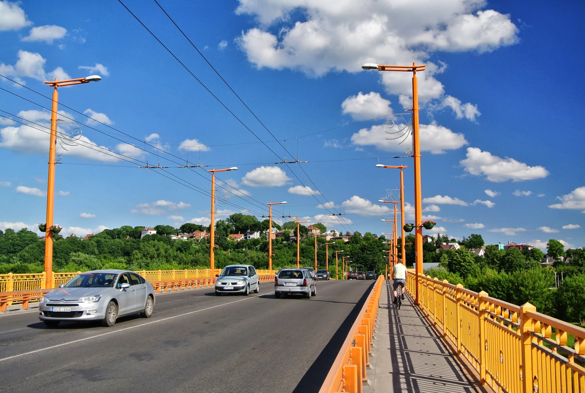 Centras, Kaunas, Lithuania